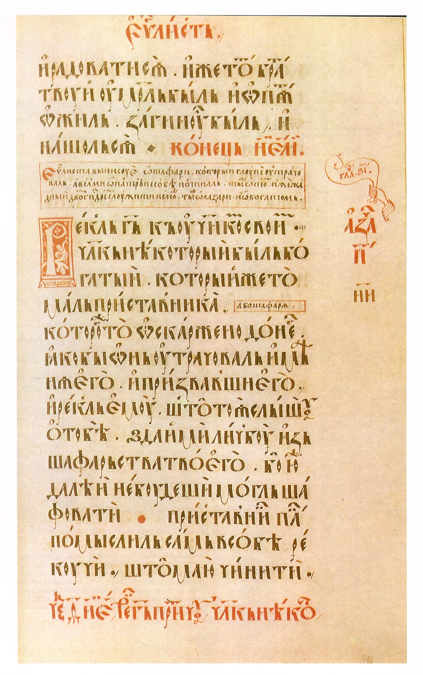 Сторінка.